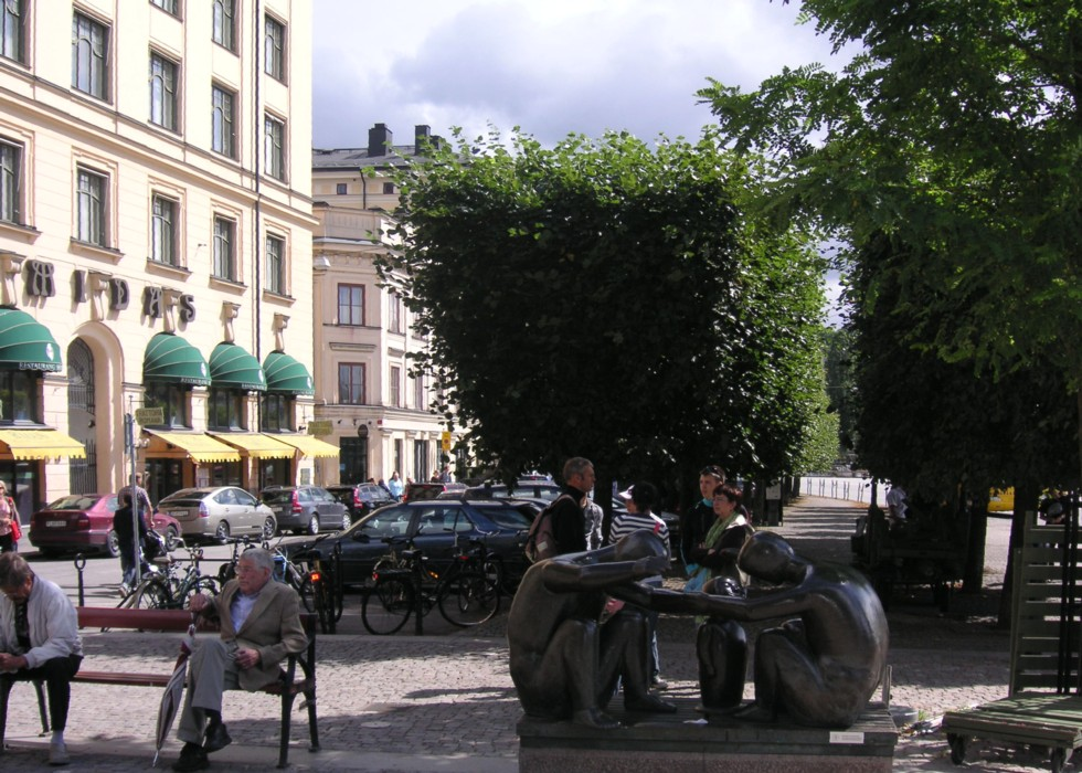 Mälartorget i Stockholm, med bronsskulpturen "Familjen" av Pye Engström, rest 1973, sammansatt av rörliga delar och en fontändamm.